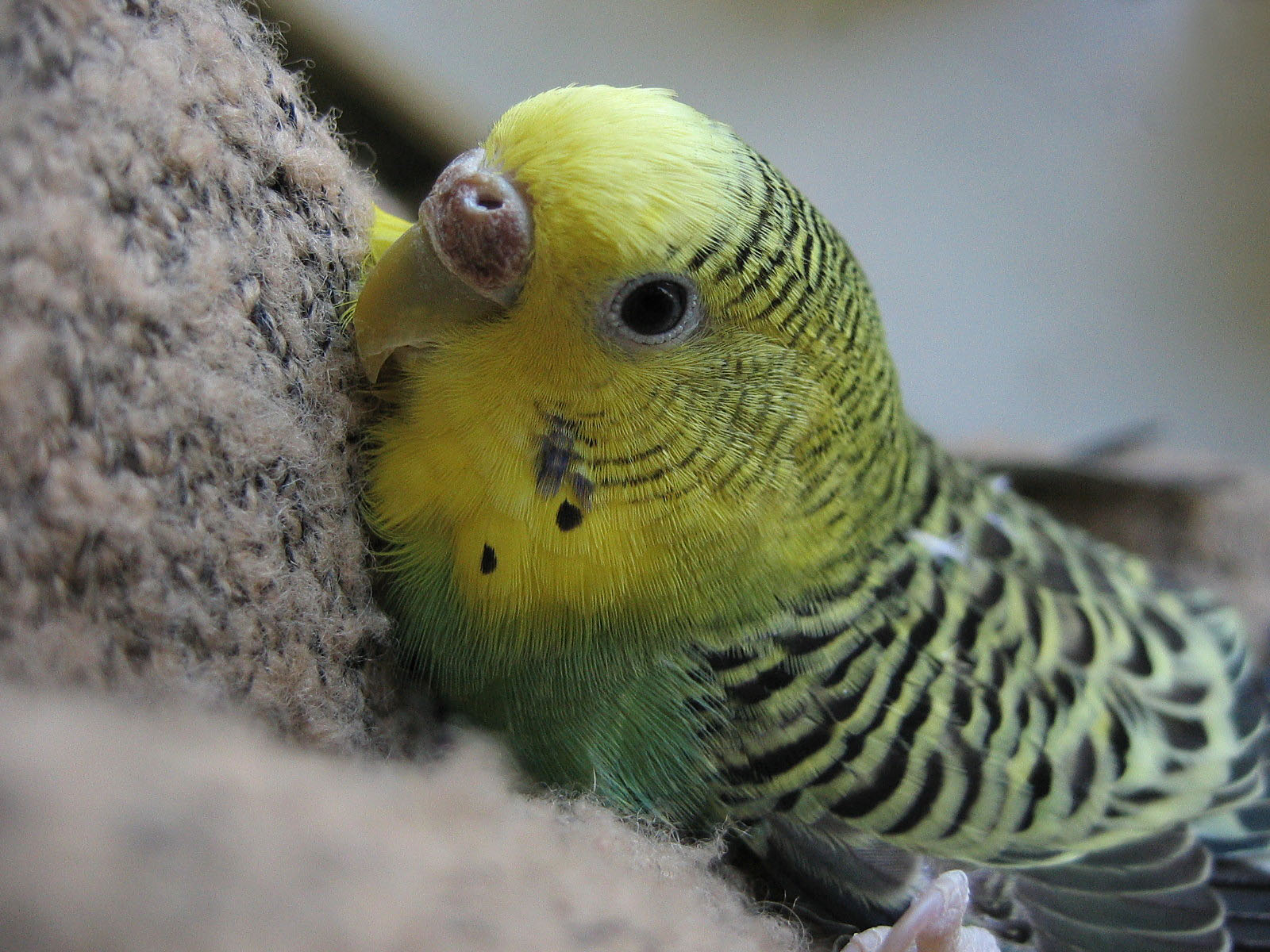 Papużka falista Budgerigar